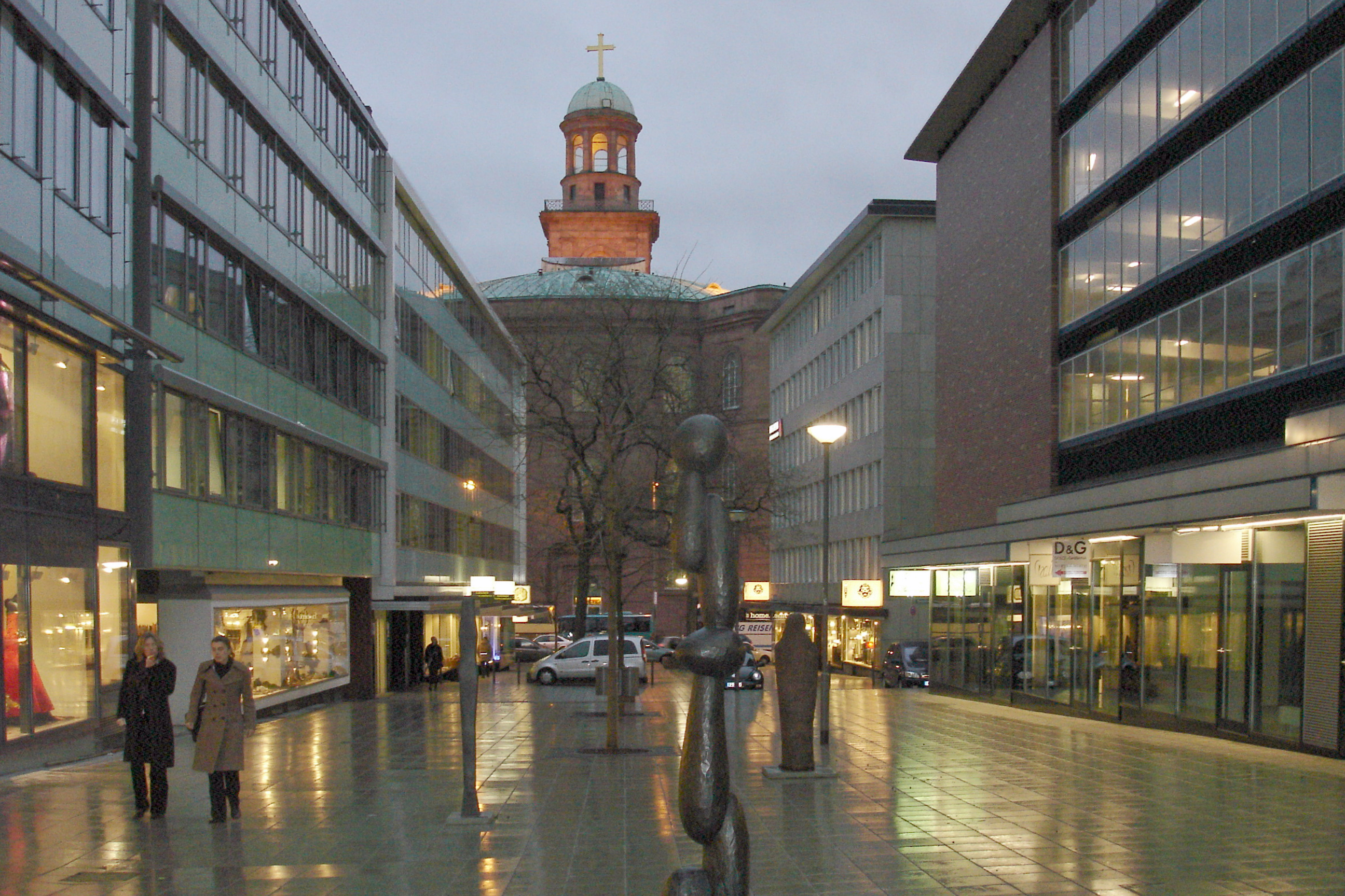 Rückseite der Frankfurter Paulskirche bei Nacht